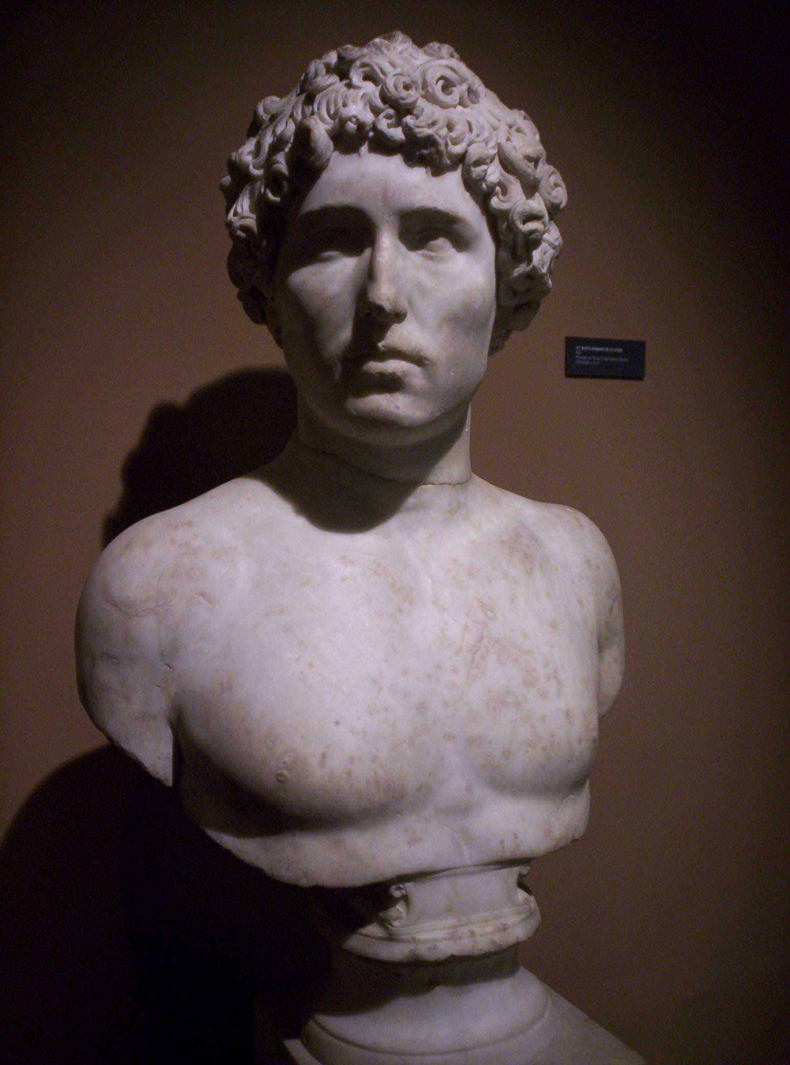 Busto romano de un joven. Itálica (Santiponce). Siglo II d.C. Exposición temporal "Tesoros de la Hispanic Society of America" en el Museo Arqueológico de la Comunidad de Madrid.